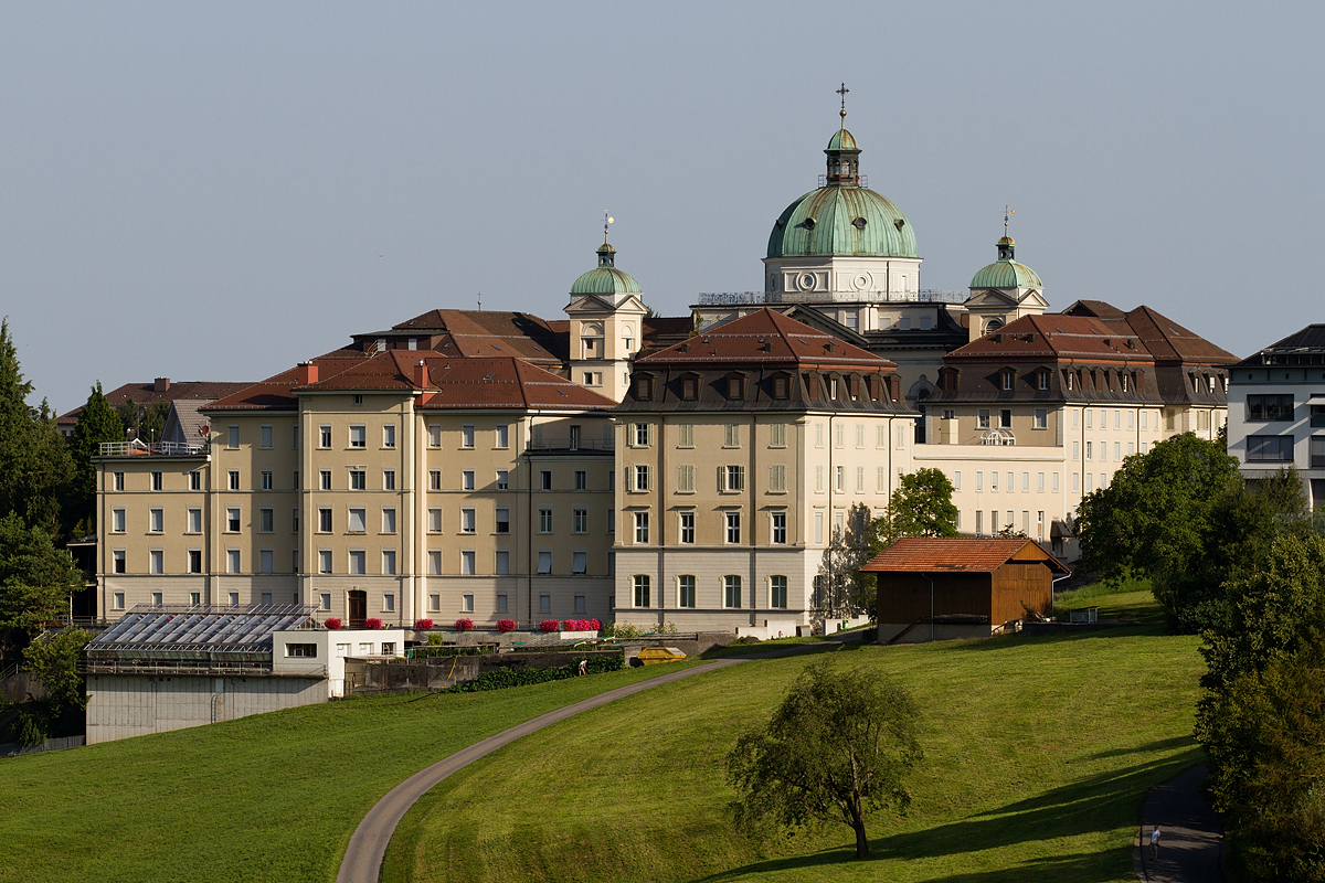 Lehrschwesterninstitut (1844) und Provinzkapital der Schwestern vom Heiligen Kreuz Menzingen